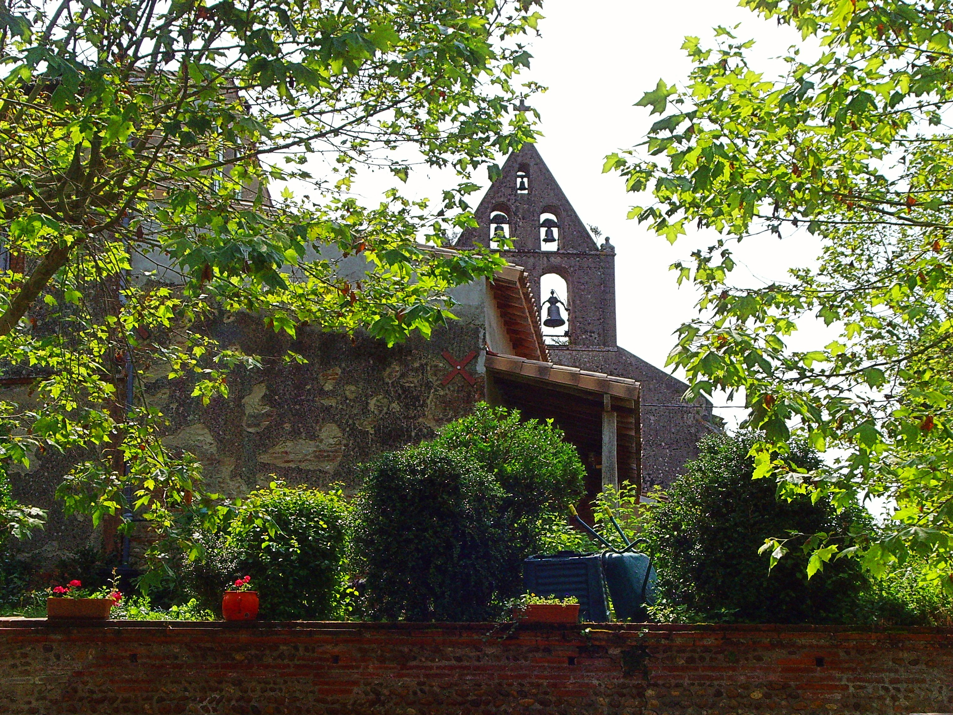 Le clocher de l'église d'Esperce (Haute-Garonne, France)